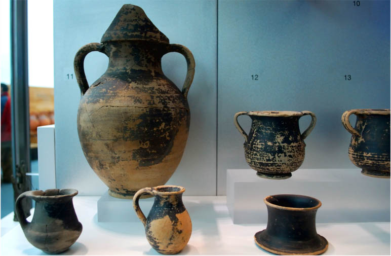 Cerámica campaniense republicana procedente de un pecio romano encontrado en la isla de Escombreras (Cartagena). Museo Nacional de Arqueología Subacuática (ARQUA) en Cartagena (España)